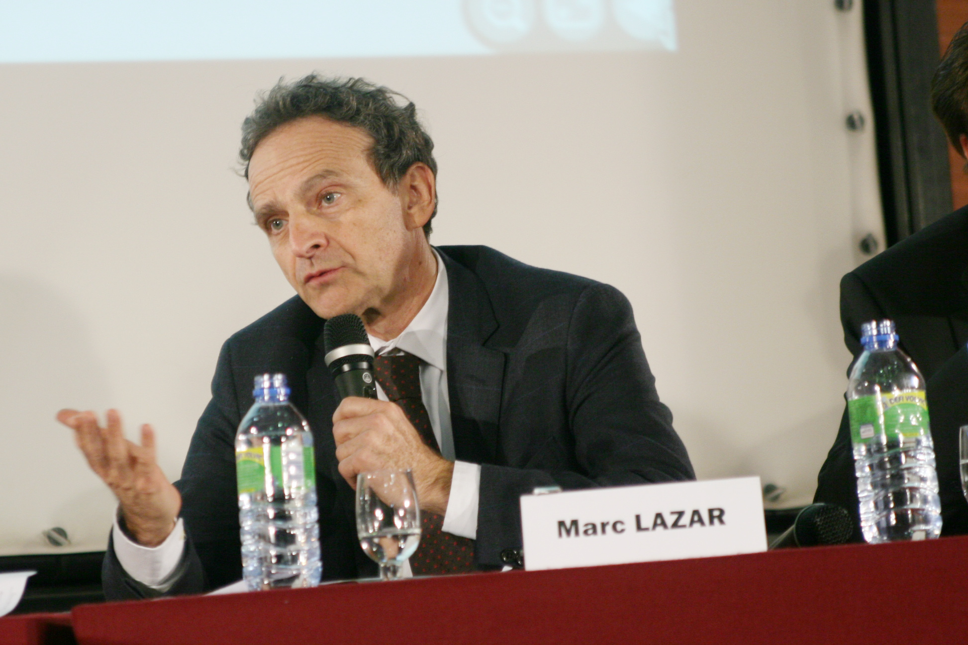 Marc Lazar le 6 novembre 2009 lors du colloque international "Sortir du communisme, changer d'époque" organisé par Fondapol en partenariat avec la Fondation Robert-Schuman.